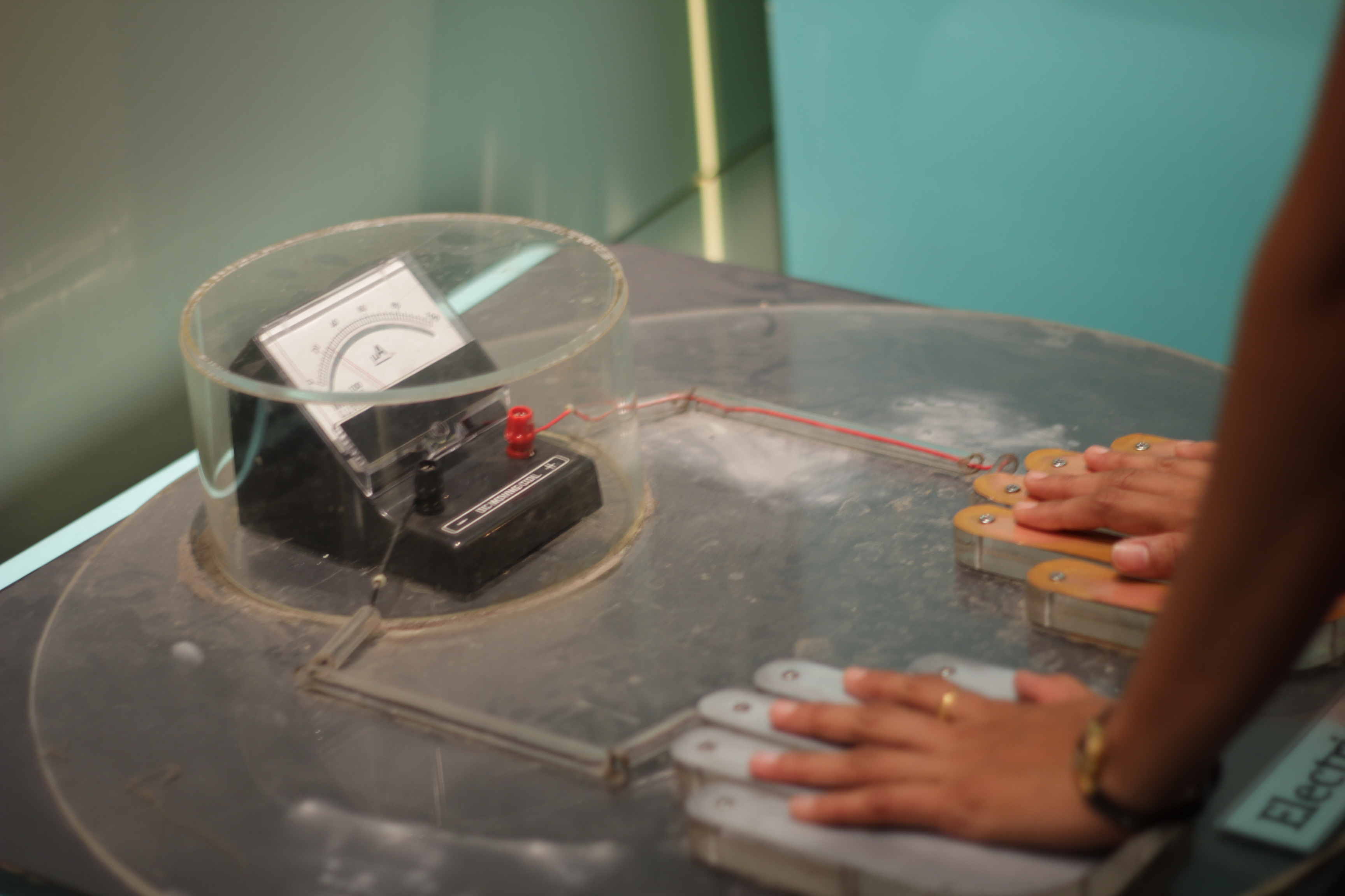 ગુજરાતી: અવરોધનો વૈજ્ઞાનિક પ્રયોગ.